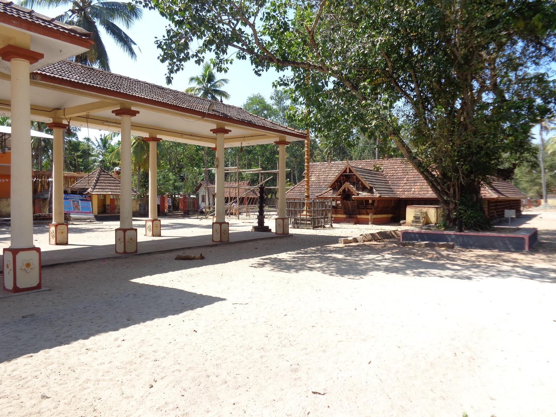 karazhma devi temple, chennithala, mavelikara